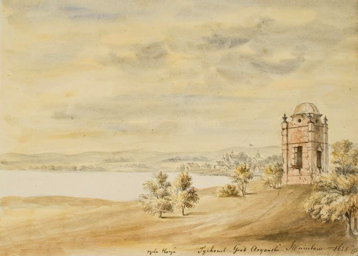 Каплися Сенют у Тихомлі.